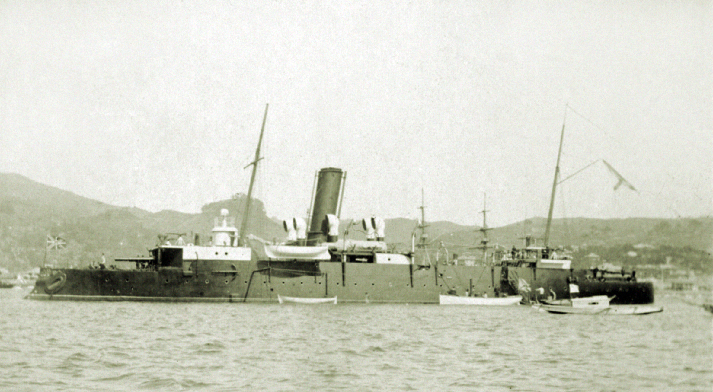 МКЛ Гремящий в период 1896-1897 годов